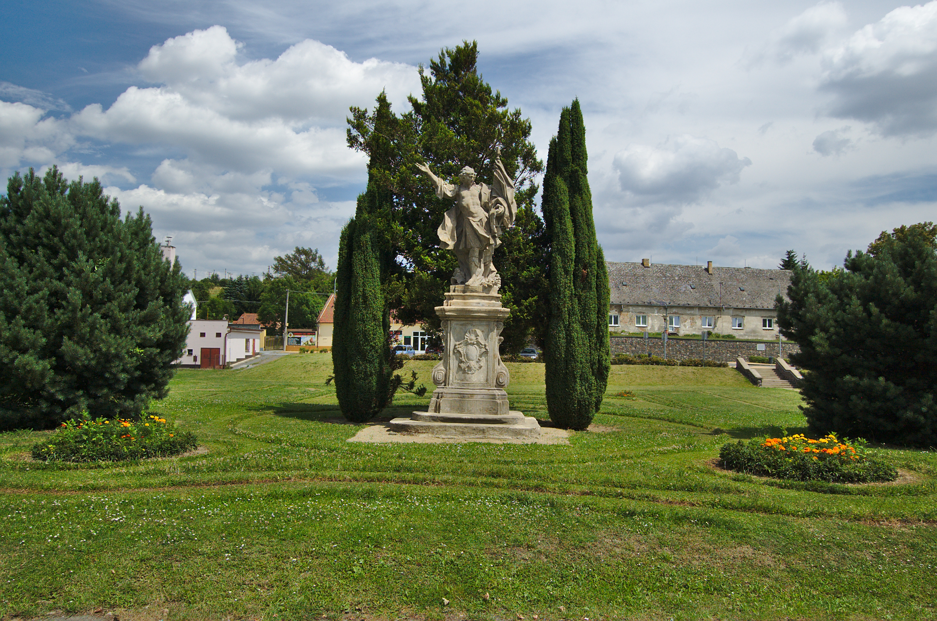 Socha svatého Floriána před zámkem, Konice, okres Prostějov